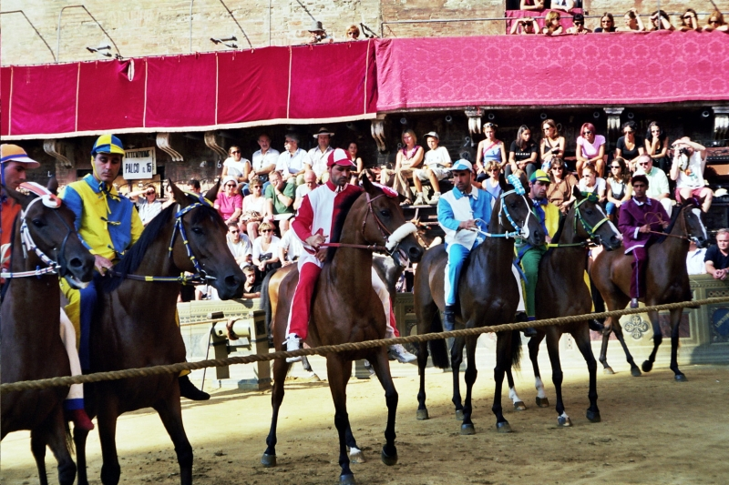 alla mossa